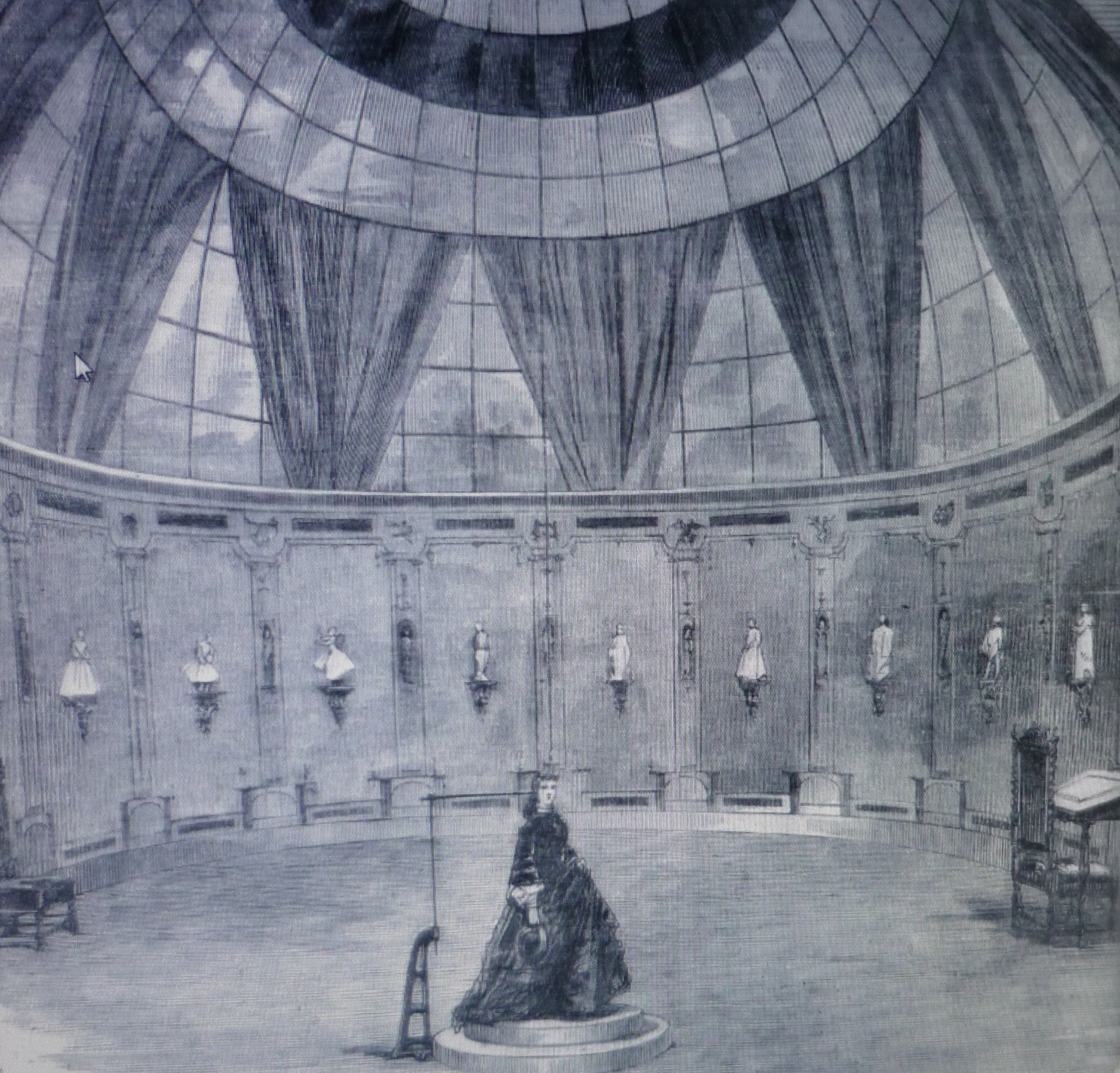 La rotonde du laboratoire de photosculpture de François Willème 42 avenue de Wagram à Paris. Ouvert en 1862, l'atelier fut fermé en 1867.